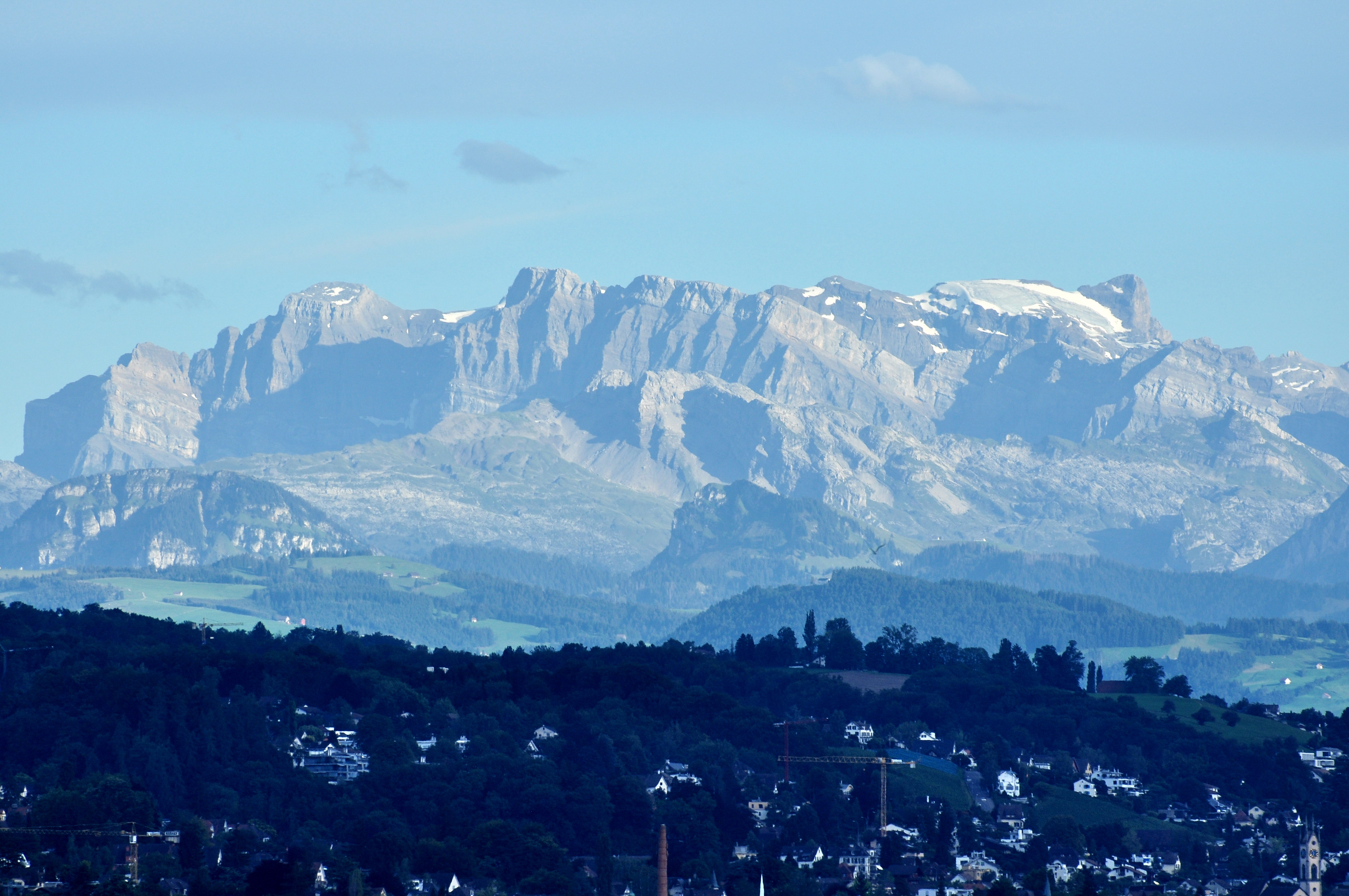 Glärnisch, as seen from Strandbad Mythenquai in Zürich-Wollishofen (Switzerland), Pfannenstiel and Etzel in the foreground.